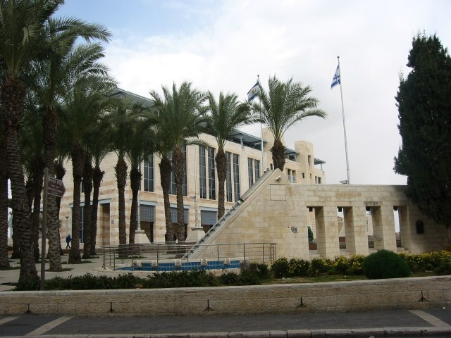 Kikar safra in jerusalem. taken by גילה ברנד